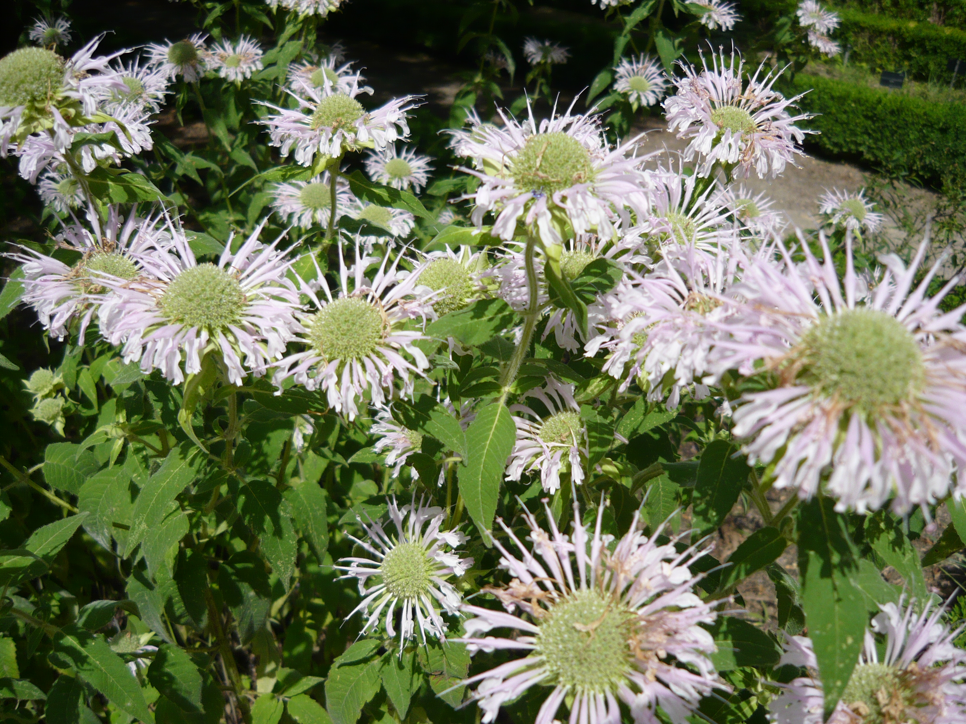 Monarda fistulosa. Real Jardín Botánico de Madrid.